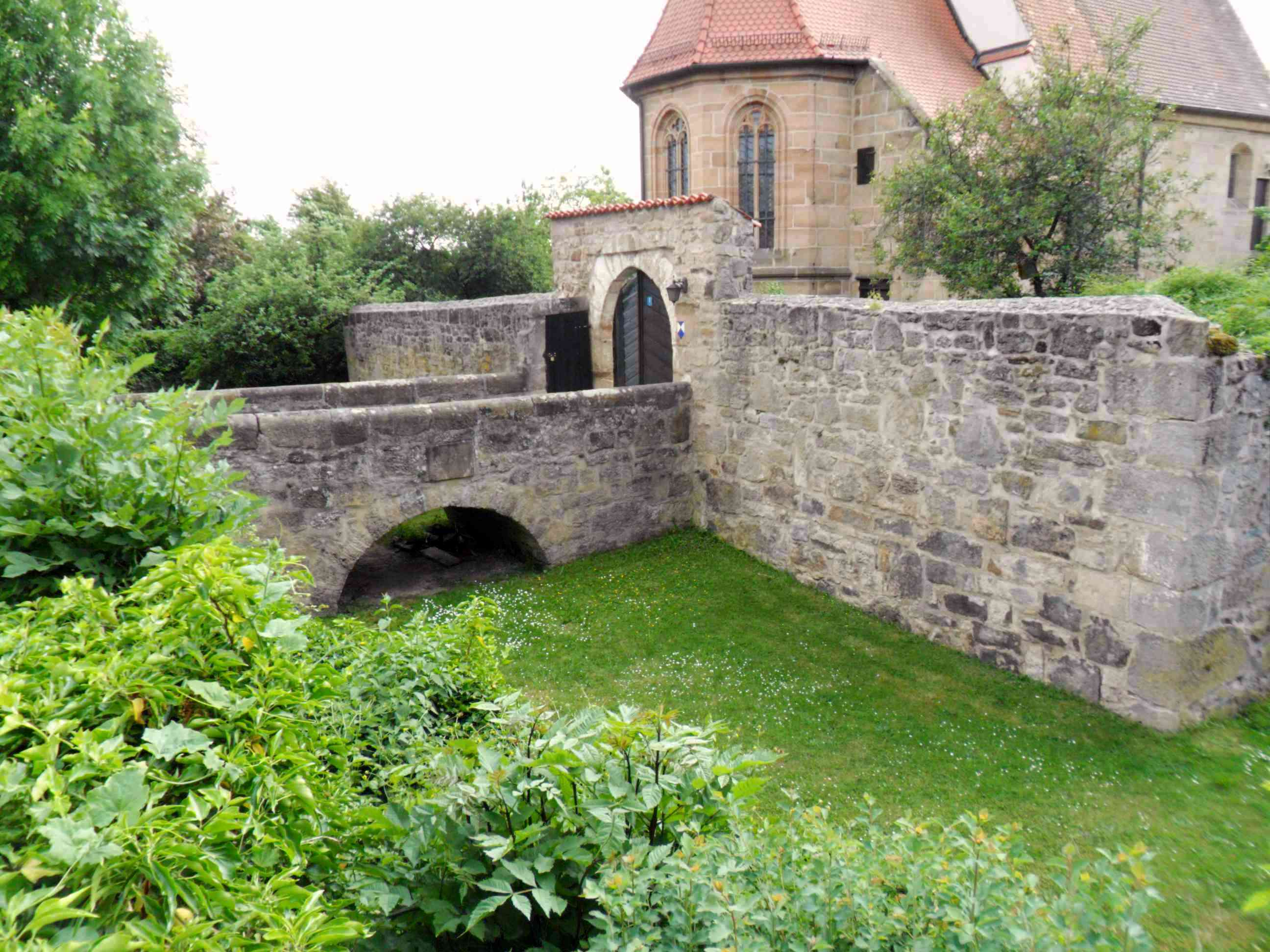 Puschendorf-Ansicht von Nordosten mit Kirche in ehemaliger Wasserburg mit Grabenbereich und jetzt fester Steinbrücke-28052012